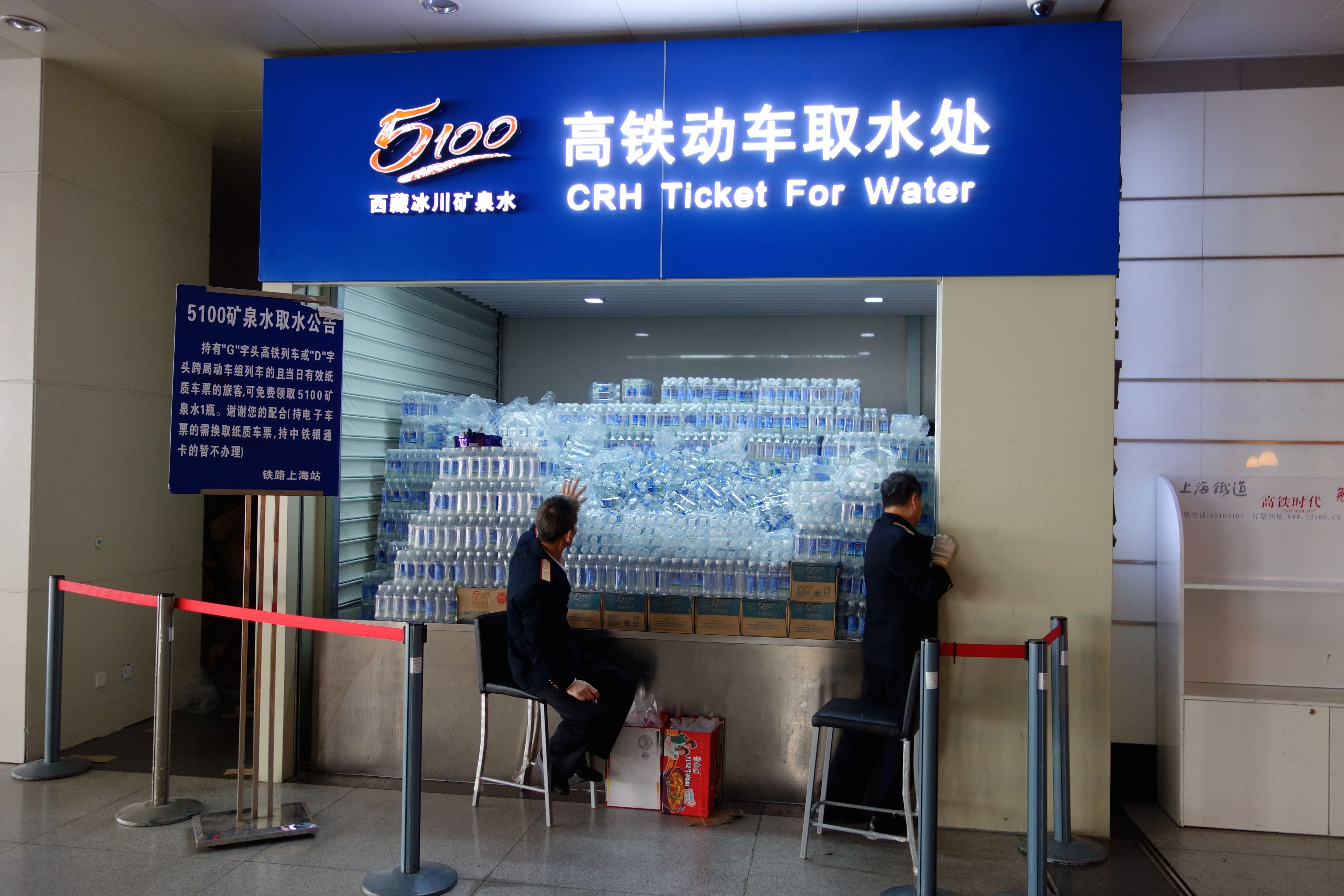 上海火车站免费发放给乘客的 5100 饮用水